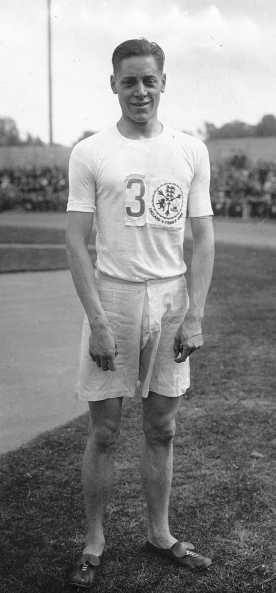 Colombes : match d'athlétisme France Angleterre : Gill, anglais, gagnant du 100 m. : [photographie de presse] / Agence Meurisse